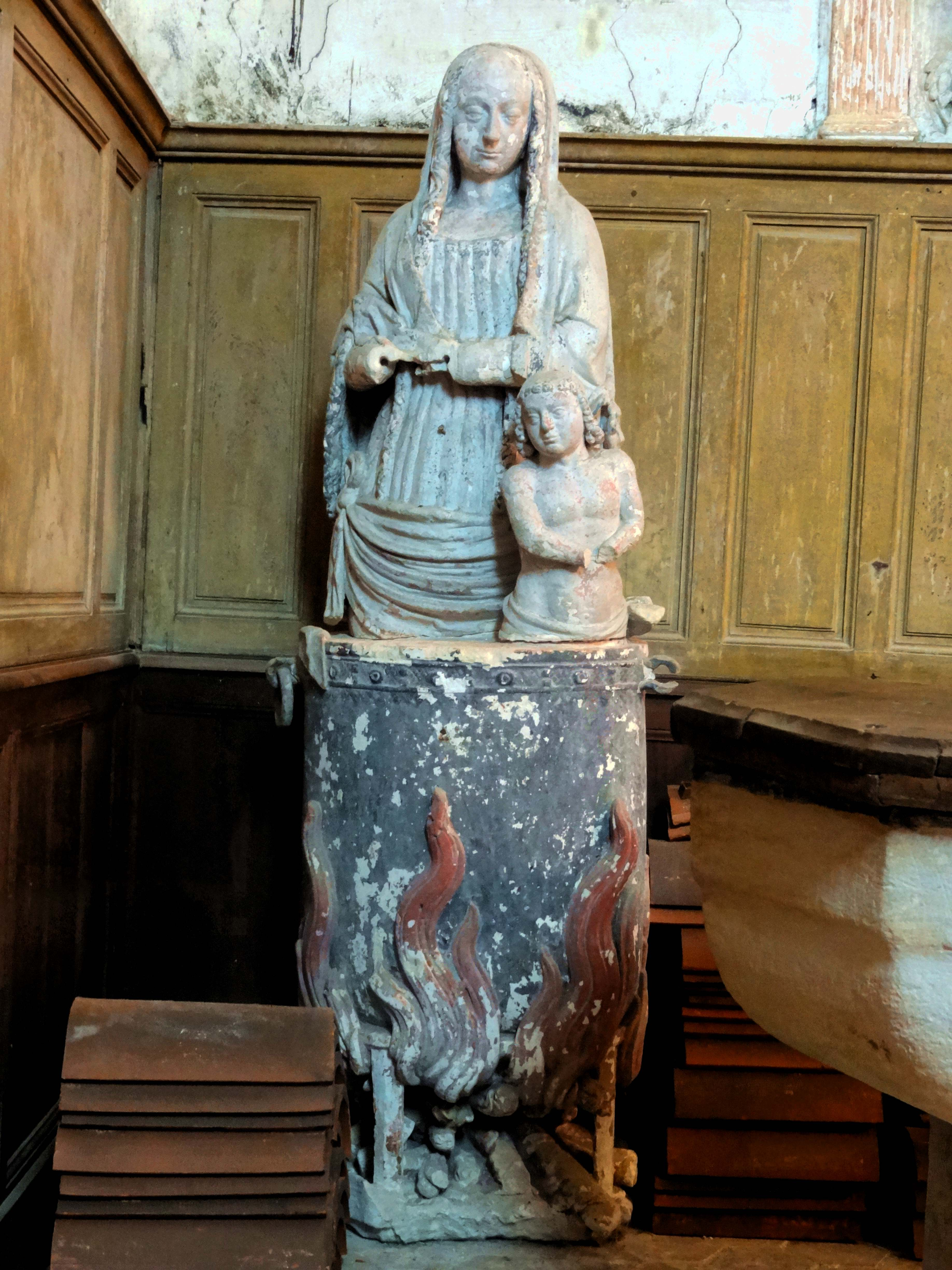 Groupe sculpté - saint Cyr et sainte Julitte, XVIIe siècle, provenant de l'église de Lèvemont qui leur fut dédiée, et qui après sa ruine a été transférée vers le domaine du baron Bich à Verberie, hameau de Saint-Germain.